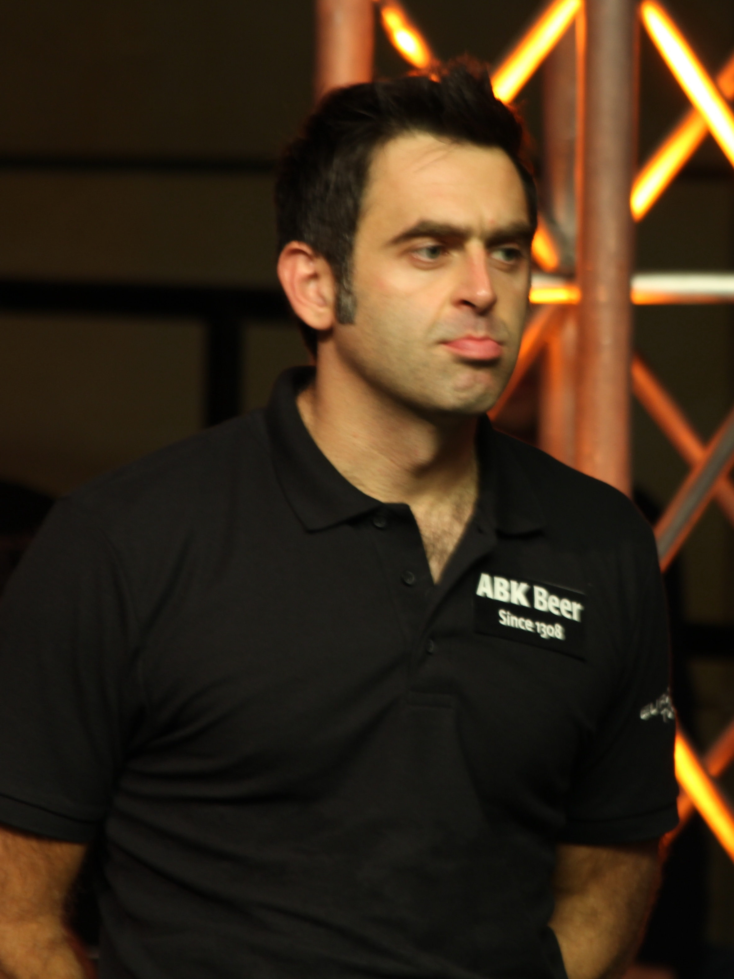 Ronnie O'Sullivan beim Paul Hunter Classic 2013 (Finale)